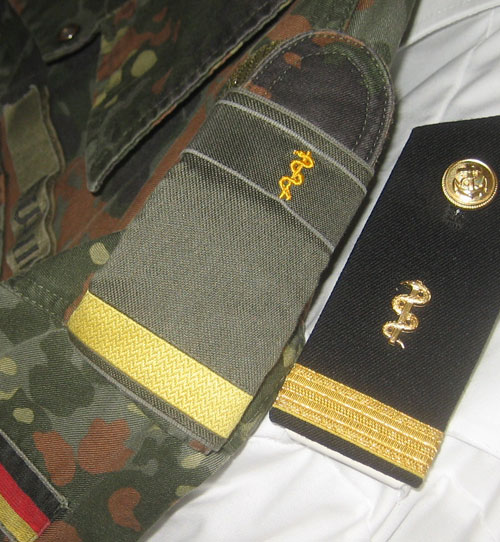 Dienstgradabzeichen eines Leutnant zur See (SanOA). Links als Aufschiebeschlaufe auf dem Feldanzug, tarndruck ("Flecktarn") rechts auf einem Diensthemd.